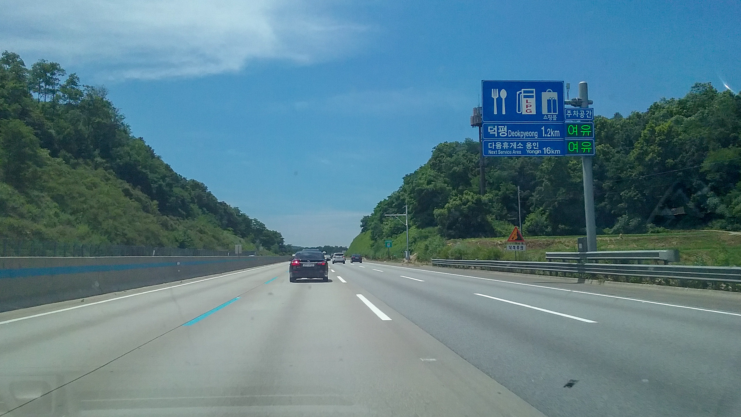 영동고속도로 덕평자연휴게소 인천 방면 1km 표지판